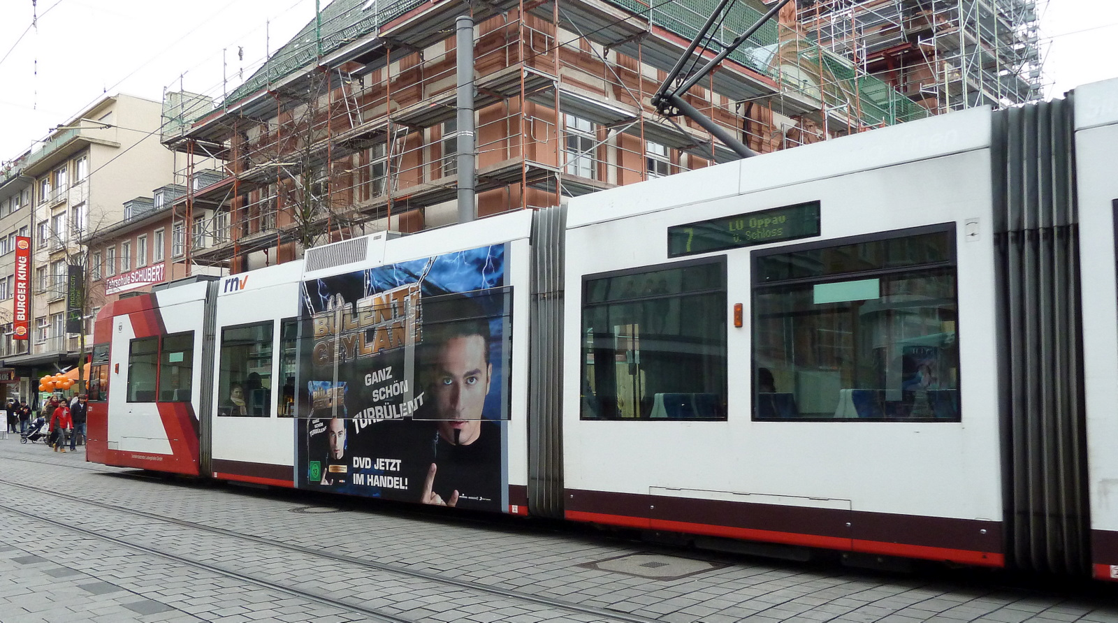 Buelent Ceylan DVD Werbung auf einer Strassenbahn in Mannheim